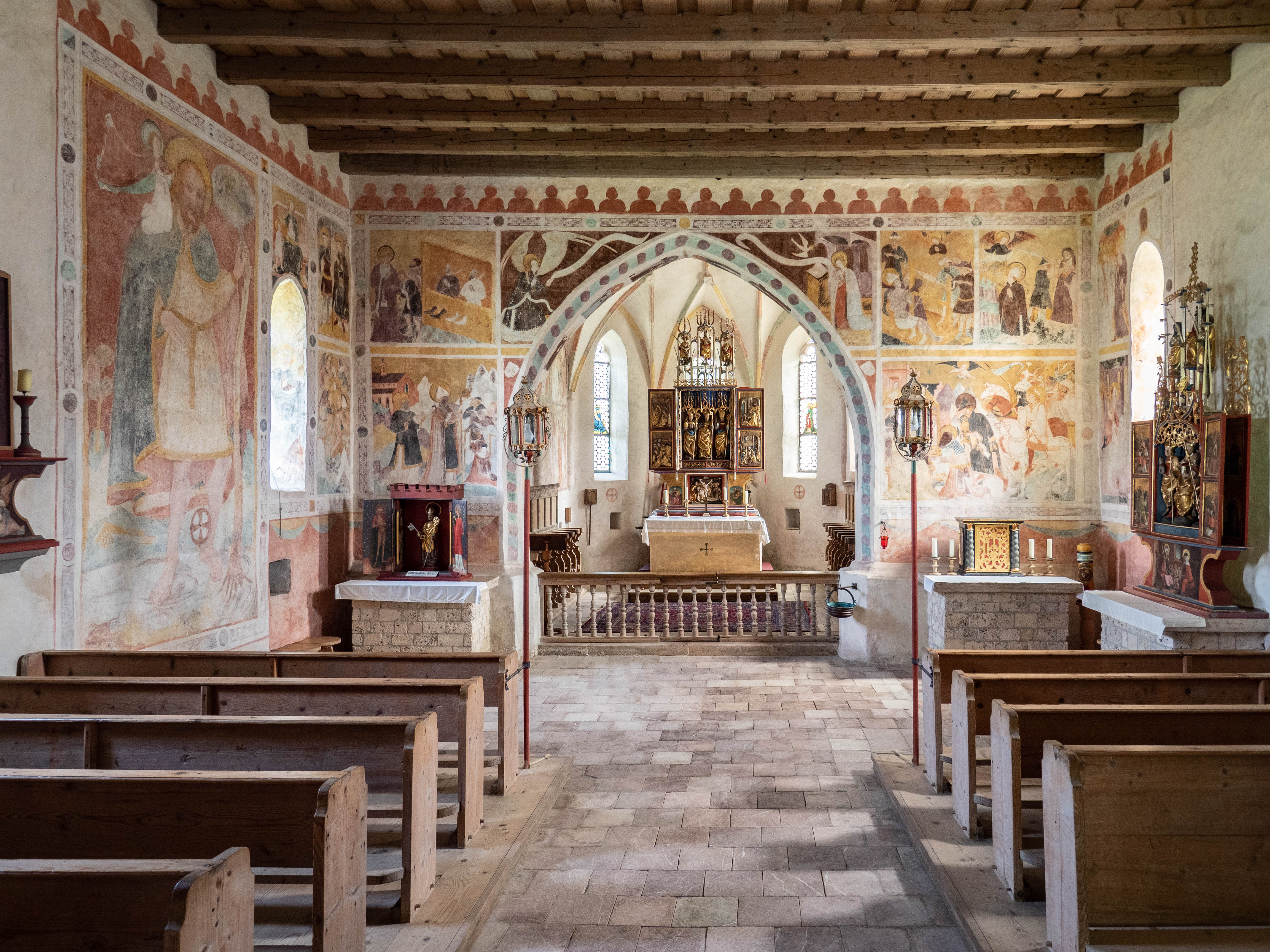 Sankt Servatius auf dem Streichen - Langhaus und Chor